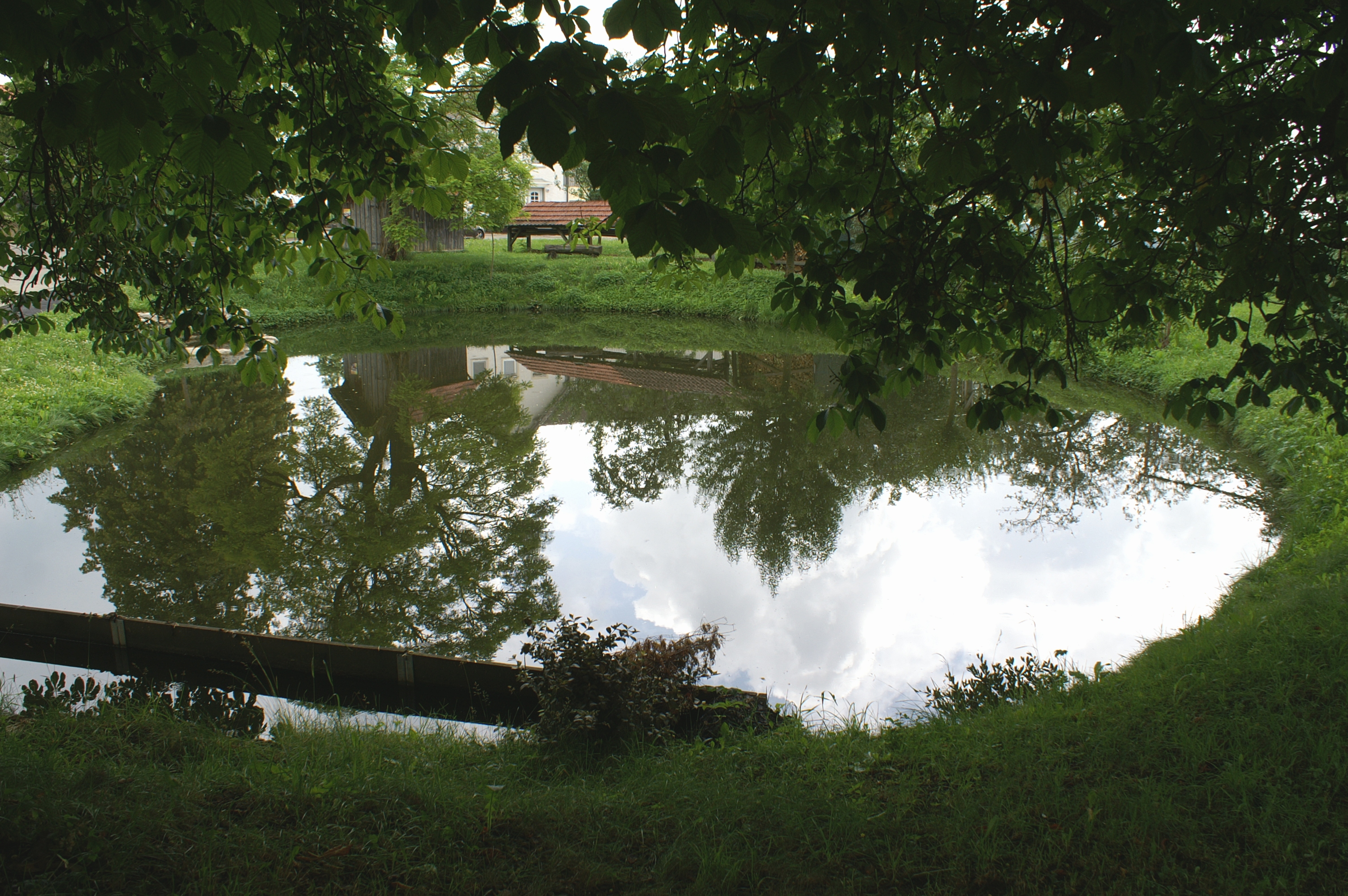 Die Hüle in Tiefenhülen im Alb-Donau-Kreis. Im Hintergrund historische Feuerwehreinrichtungen: Das Spritzenhaus und der Leiterstand.